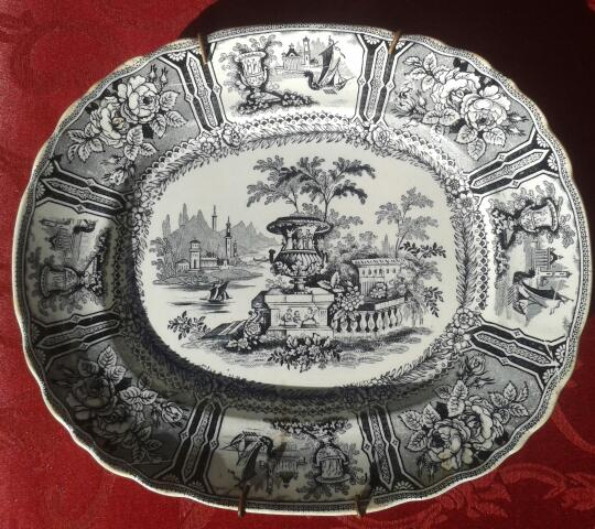 Fuente realizada en cerámica de Sargadelos. Serie Góndola. S XIX